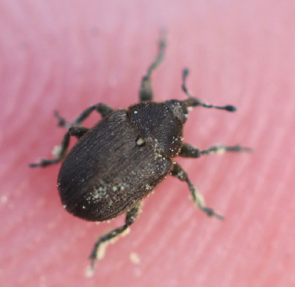 Rüsselkäfer Rhinusa neta am 9. November 2018 in Walldorf/Baden an Leinkraut